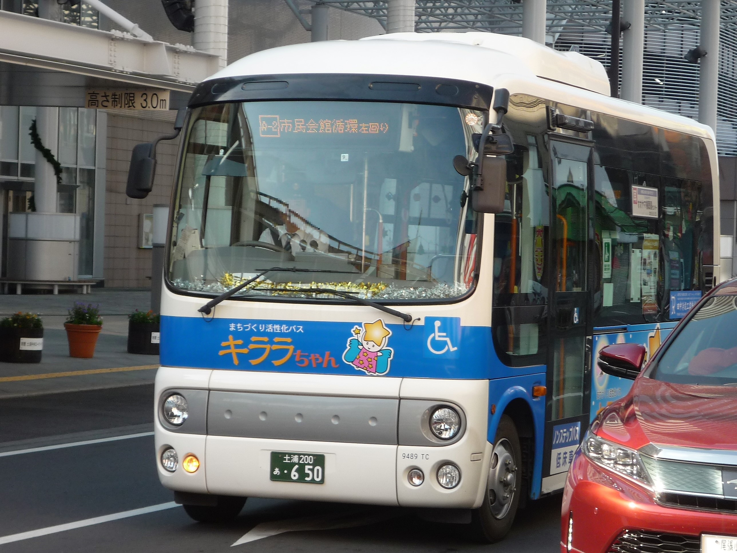 土浦市・まちづくり活性化バス「キララちゃん」 Panasonic Lumix DMC-FS3